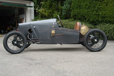 DeMarcay Cyclecar 1922 mit Anzani Motor